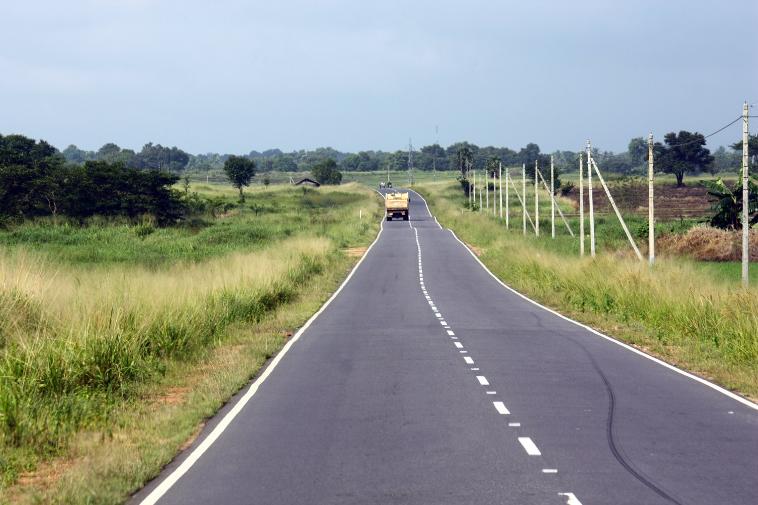 இலங்கையின் மட்டகளப்பு மாவட்டப் பகுதி